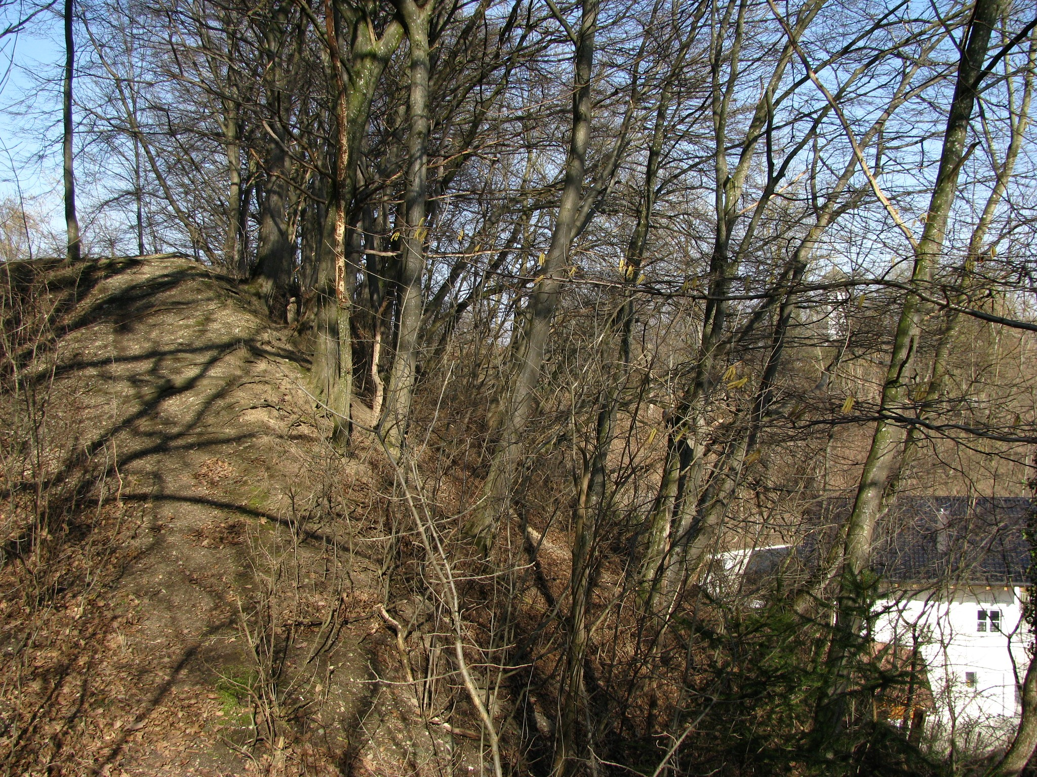 Burgstall Alling, südlicher Steilhang